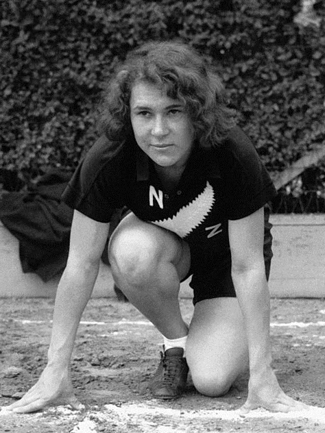 Thelma Kench, athlète de Nouvelle Zélande s'entraînent pour les Jeux Olympiques à Los Angeles, Californie, Etats-Unis le 3 juillet 1932.